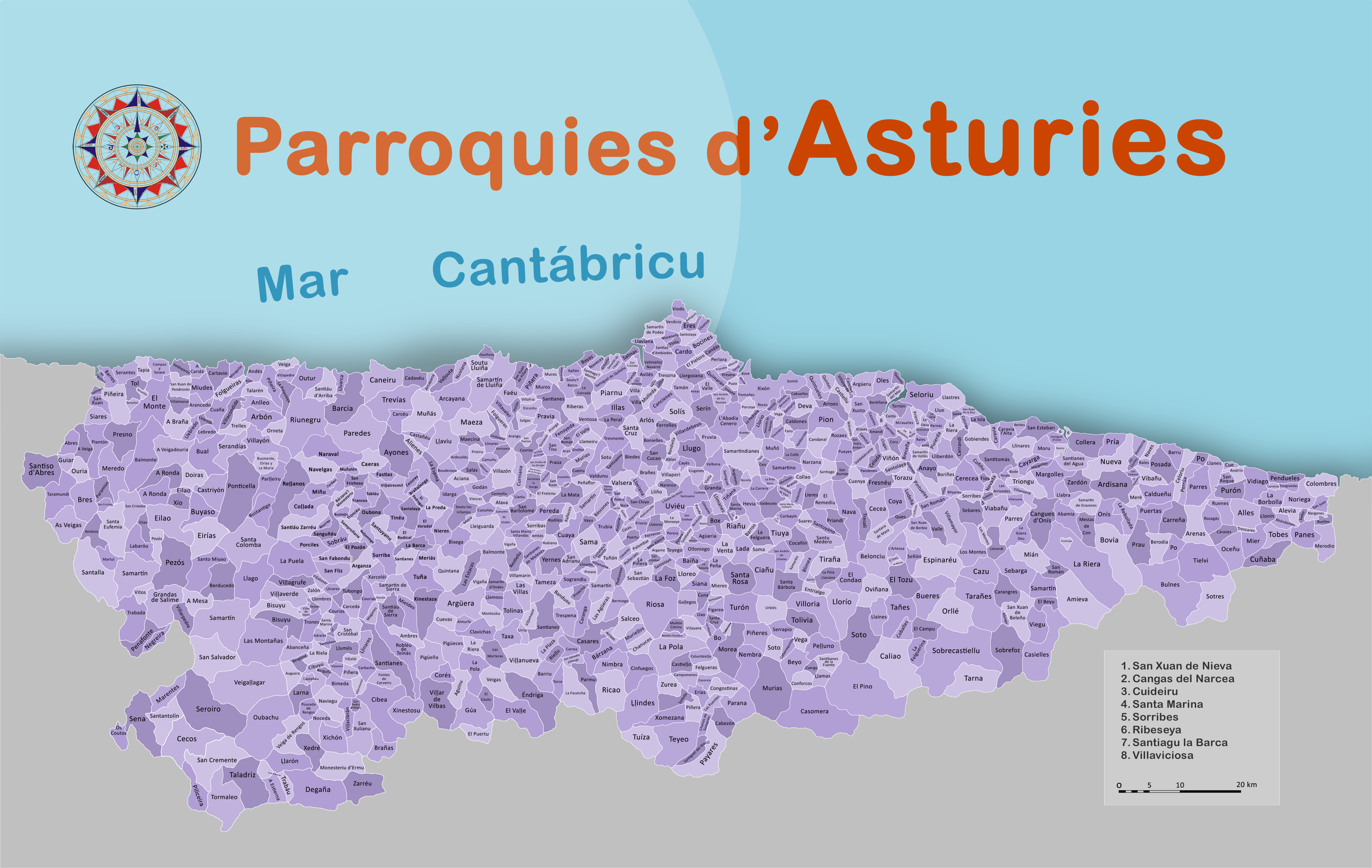 Mapa de les Parroquies d'Asturies